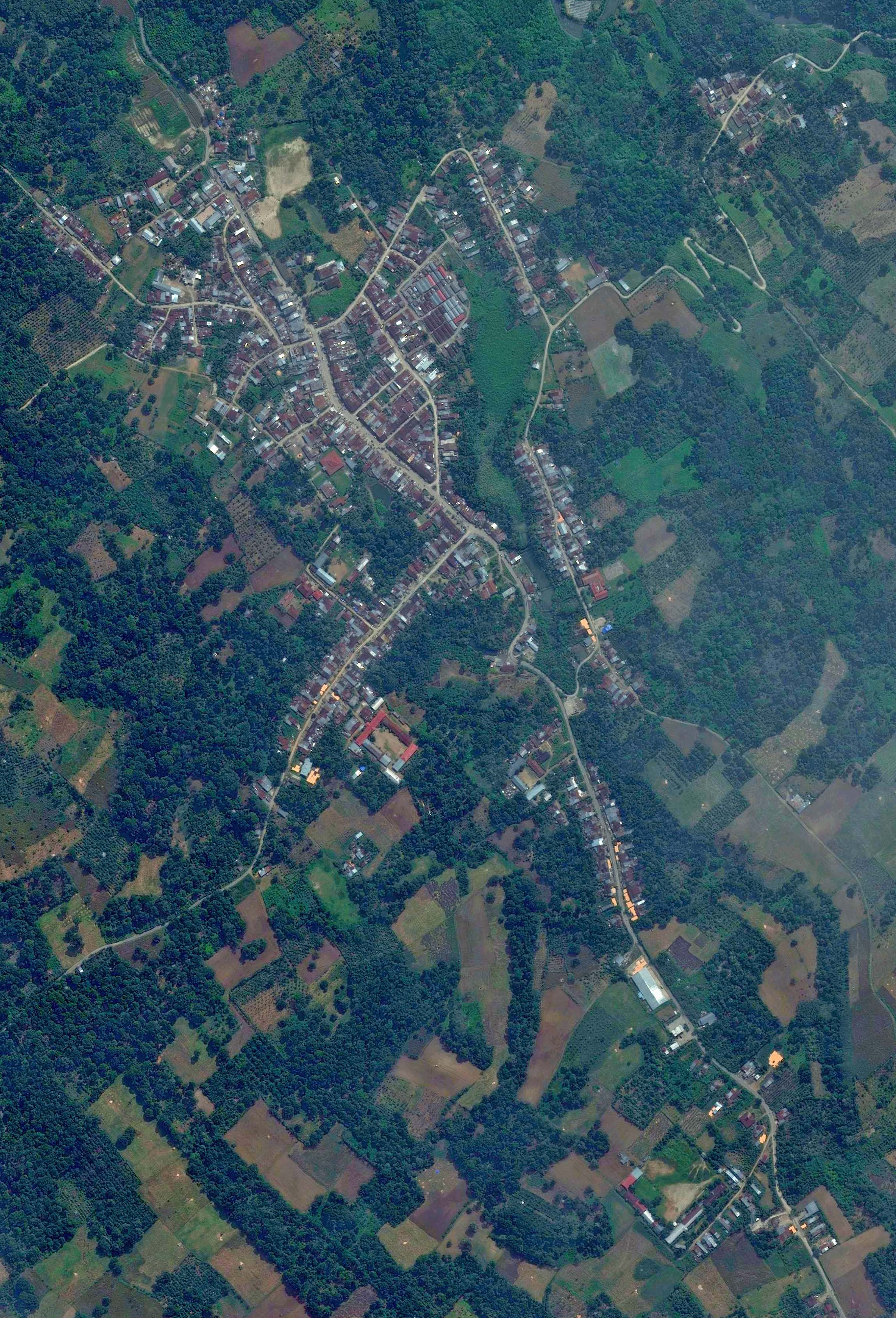 peta desa tigalingga dan sekitarnya